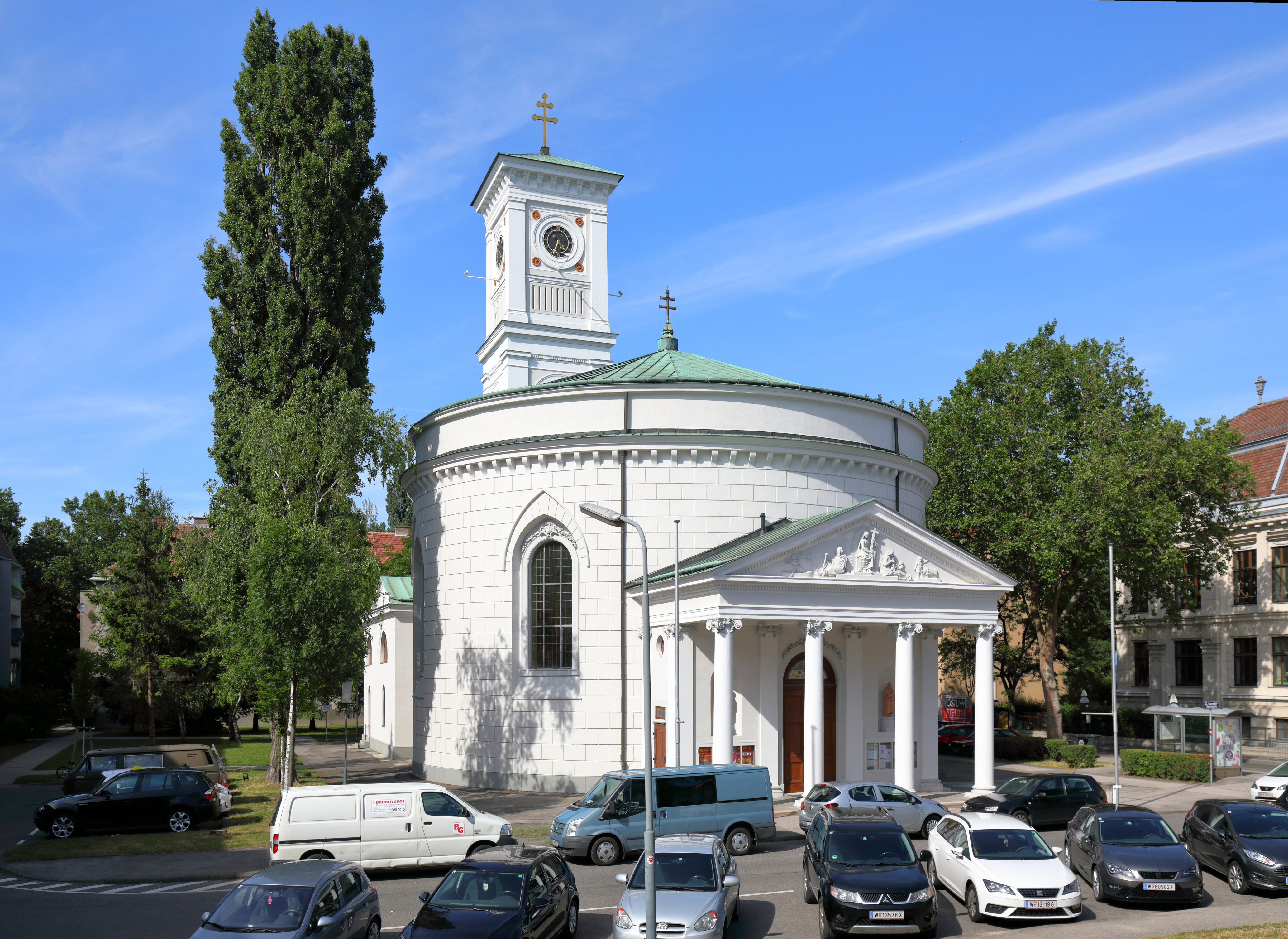 Die röm.-kath. Pfarrkirche St. Nikolaus in Inzersdorf, ein Stadtteil Wiens im 23. Wiener Gemeindebezirk Liesing.Die Kirche, ein Rundbau mit Altarapsis, Portikus und Campanile im oberitalienischen Klassizismus, ließ der damalige Gutsbesitzer Herzog von Corigliano von 1817/18 bis 1820 errichten, nachdem die gotische Vorgängerkirche 1817 abbrannte. 1845/1846 erfolgten durch den Grundherrn Alois Miesbach ein Umbau und eine Erweiterung um eine Sakristei und einen Chor. 1860 ließ Heinrich Ritter Drasche von Wartinberg an der Ostseite der Kirche eine Kapelle als Grabkapelle für seinen Onkel Alois Miesbach und für das Haus Drasche anbauen. Im II. WK wurde die Kirche schwer beschädigt und bis 1960 wieder instandgesetzt.